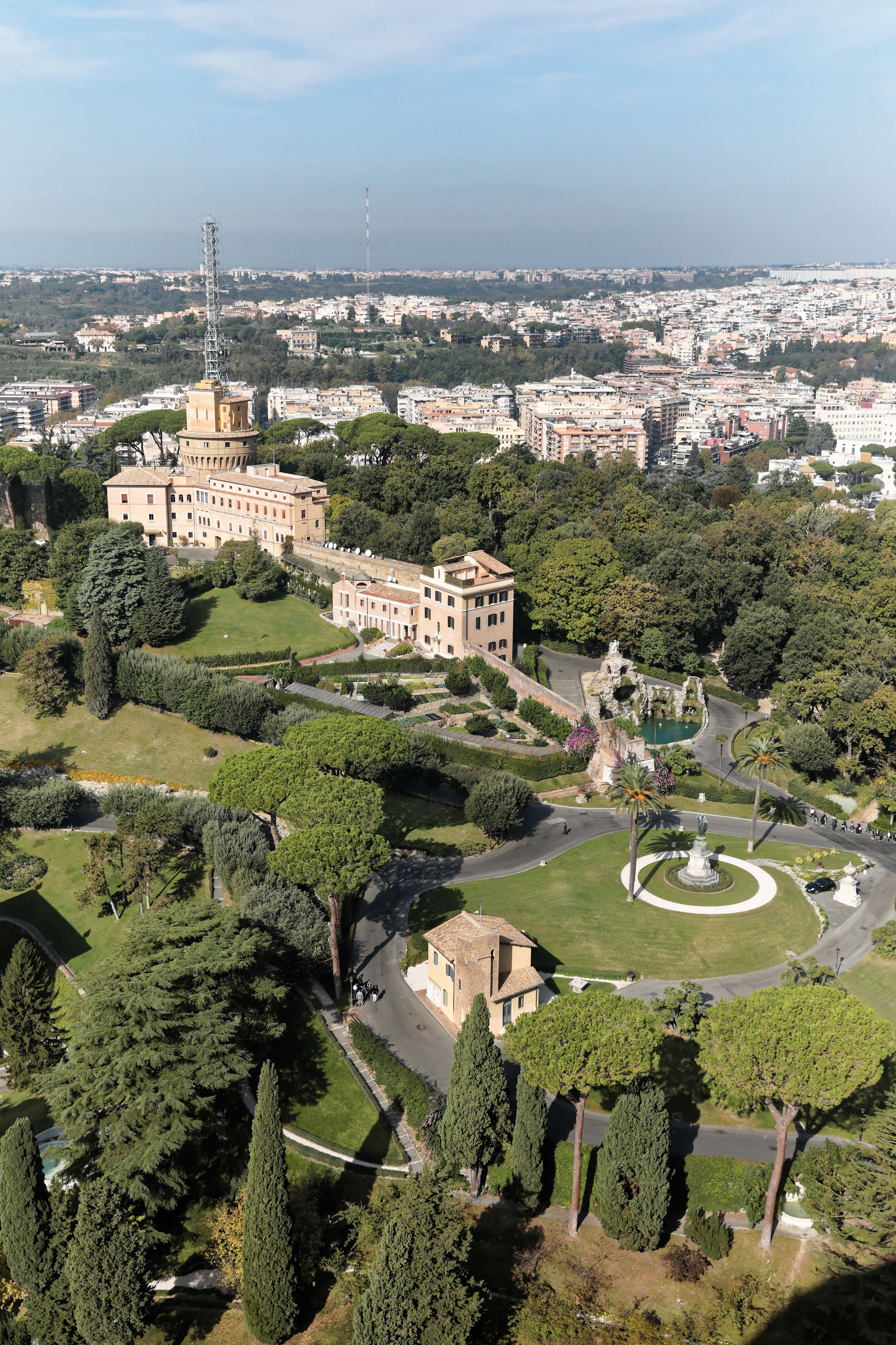 Vatikanische Gärten von der Kuppel des Petersdoms aus fotografiert